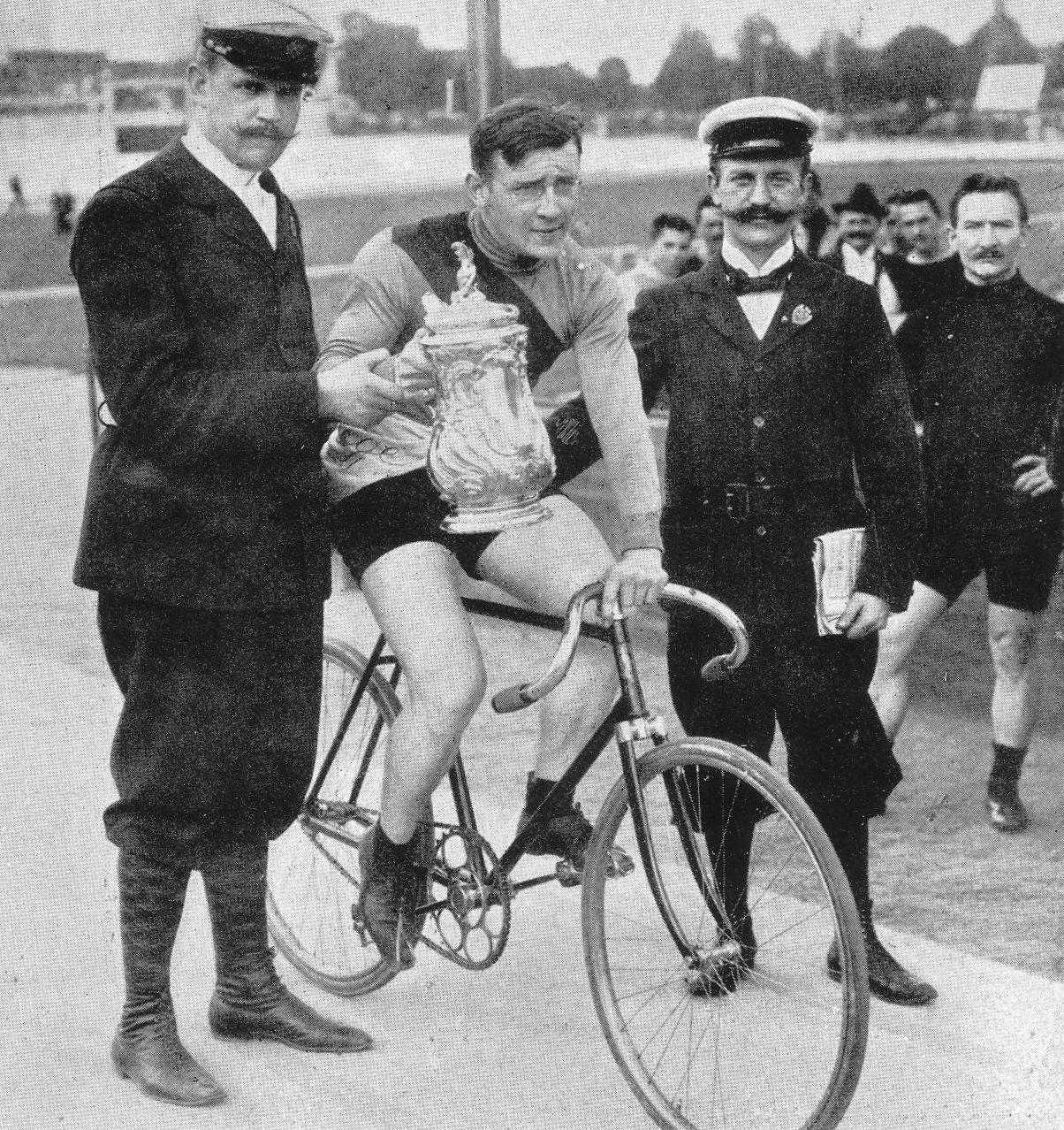 Louis Grogna, belgischer Radrennfahrer